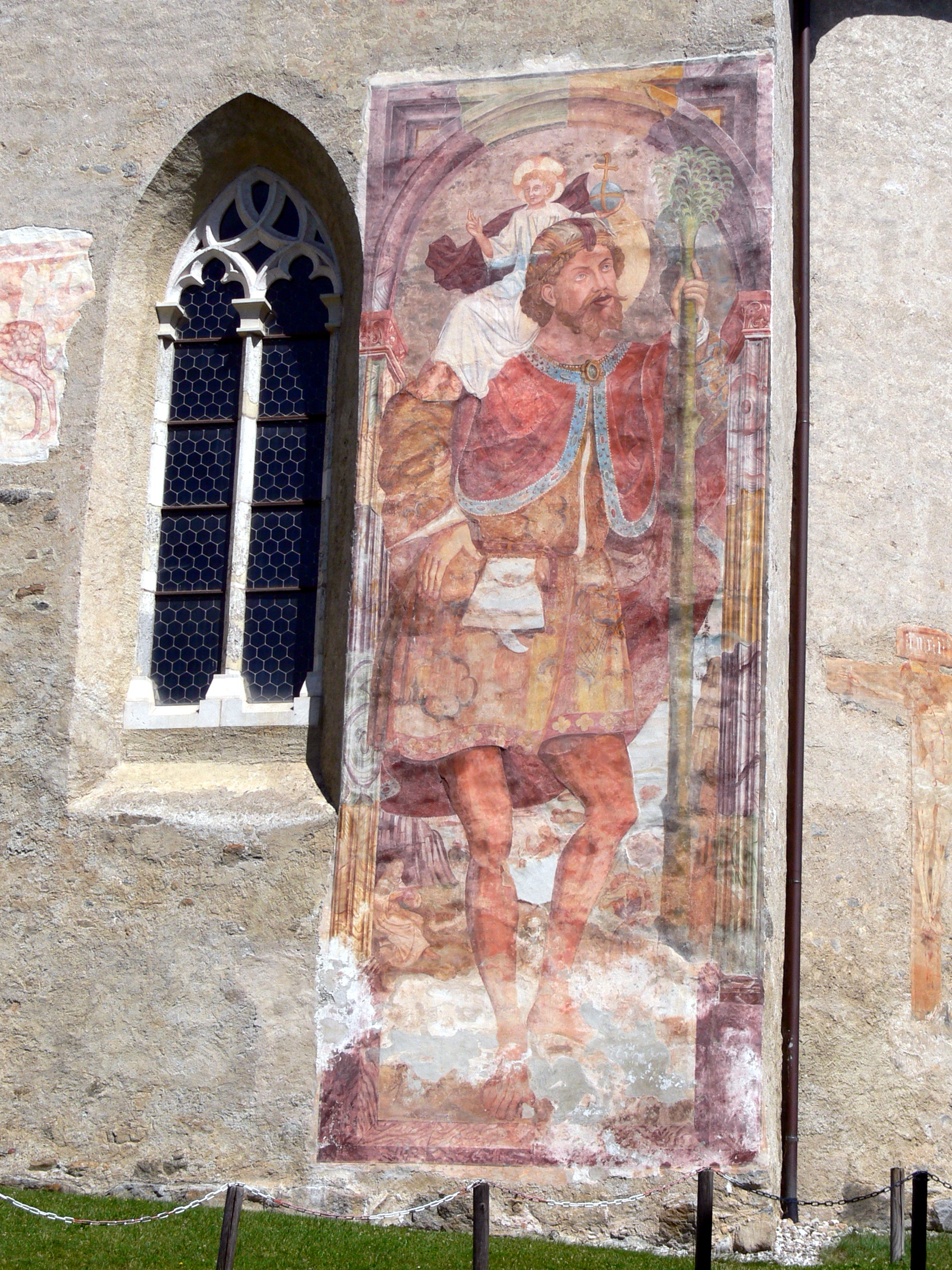 St.Georg in Taisten. Christopherus-Fresco von Simon von Taisten ( 1498 )